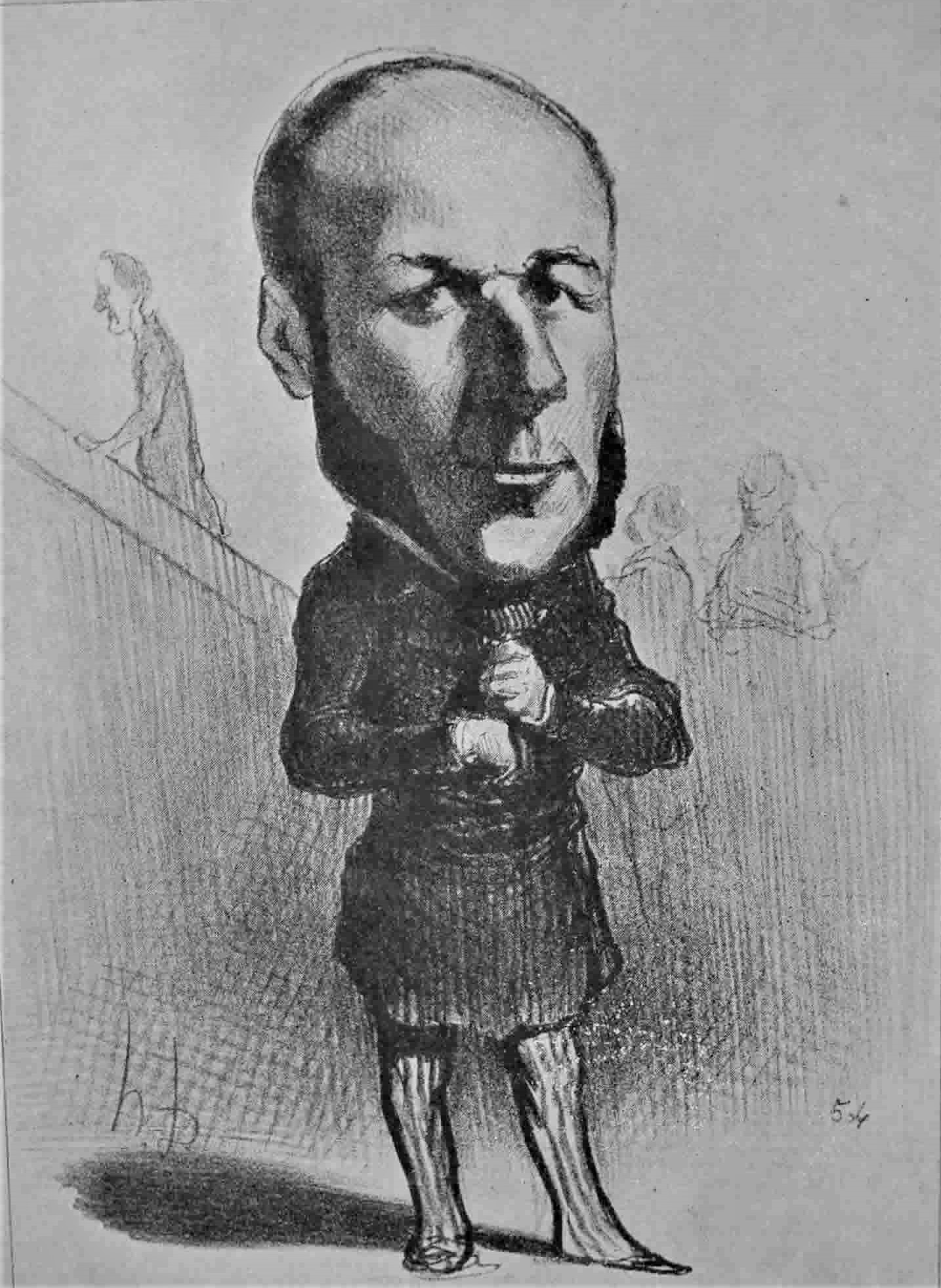 Caricature of Jules Grévy. Part of the series Les Représentants représentés.